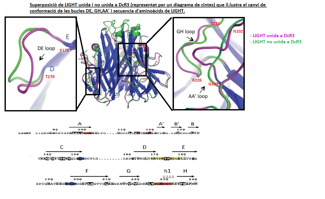 Al centre es veu dos mol.lècules de LIGHT: la verda correspòn a LIGHT quan no està unida a DcR3 i la violeta, cuan està unida a DcR3. A cada banda es veu un zoom de les bucles DE, GH i AA'. Com podem observar, LIGHT experimenta canvis conformacionals en aquestes bucles ( concretament en els aminoàcids senyalats). A baix de la imatge, la secuència de aminoàcids ens informa dels aminoàcids que formen aquestes bucles. Ha estat editat a partir de les imatges de l'article " Mechanistic basis for functional promiscuity in the TNF and TNF receptors superfamilies: structure of the LIGHT: DcR3 assembly".